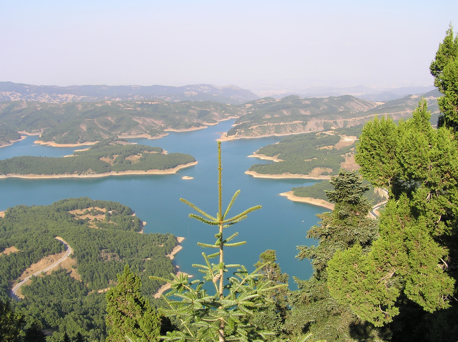 Озеро Пластира. Вид от Паратиритирио.